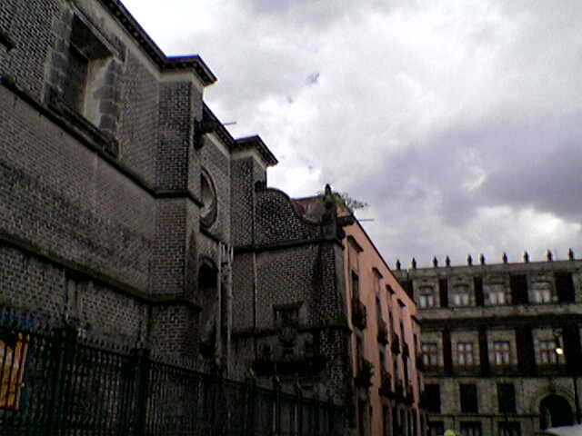 Casa de la primera imprenta, Universidad Autonoma Metropolitana, Mexico City, photo by Bernardo Bolaños